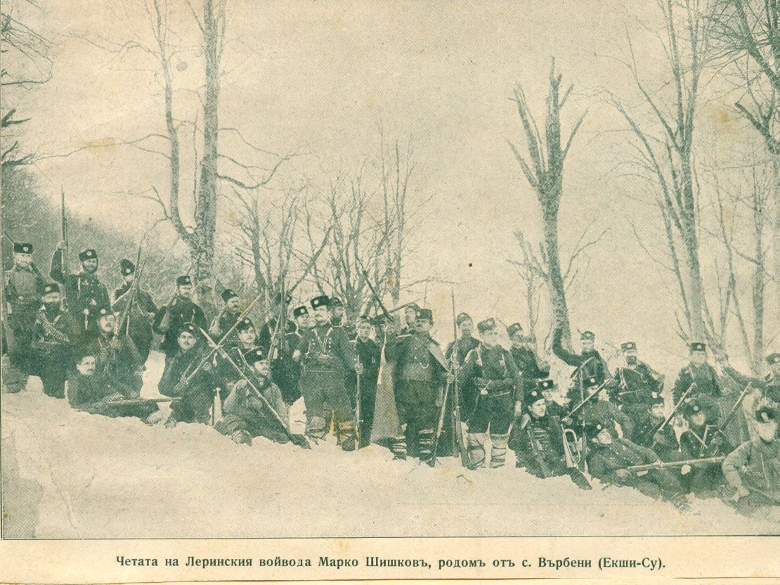 Четата на Пандил Шишков.